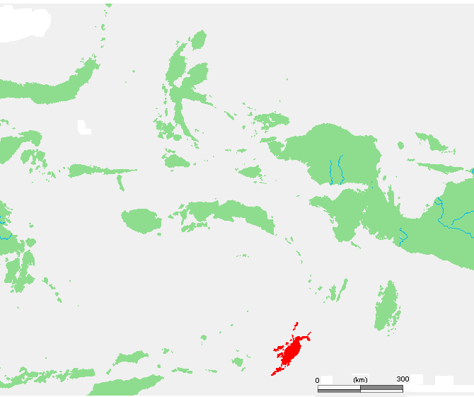 ID Tanimbar.PNG